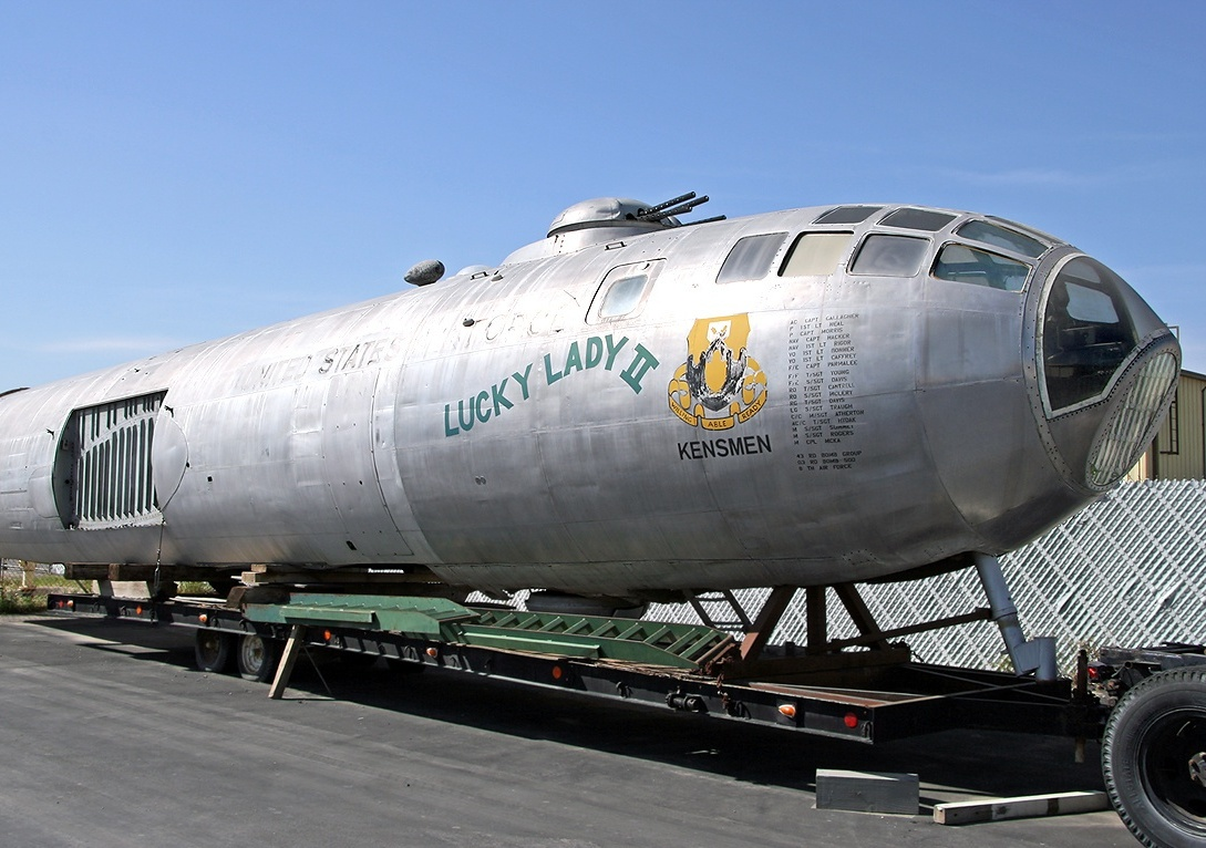 Rumpf der Boeing B-50A Lucky Lady II, der im Planes of Fame Museum in Chino, Kalifornien, ausgestellt ist